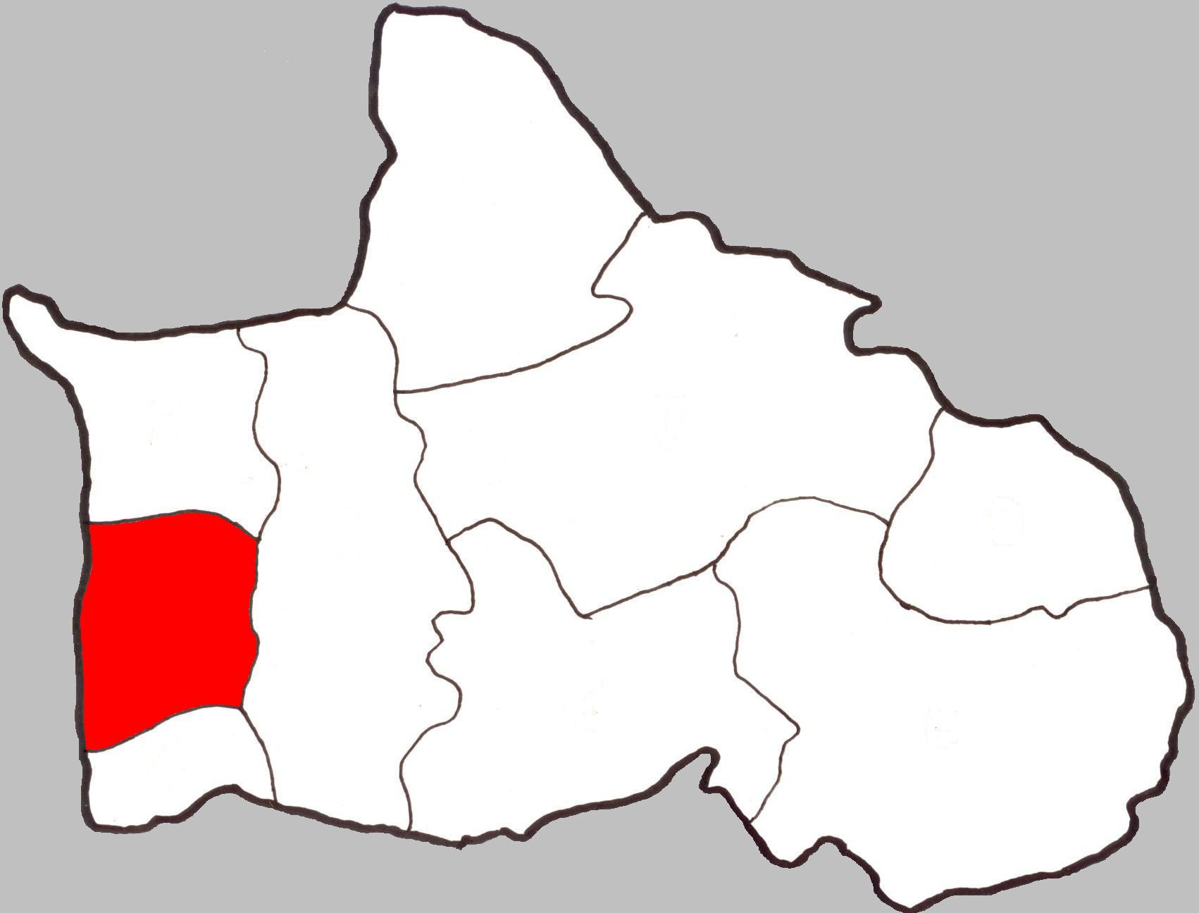 Map of Tambon Khok Salut, Bang Krathum District, Phitsanulok, Thailand